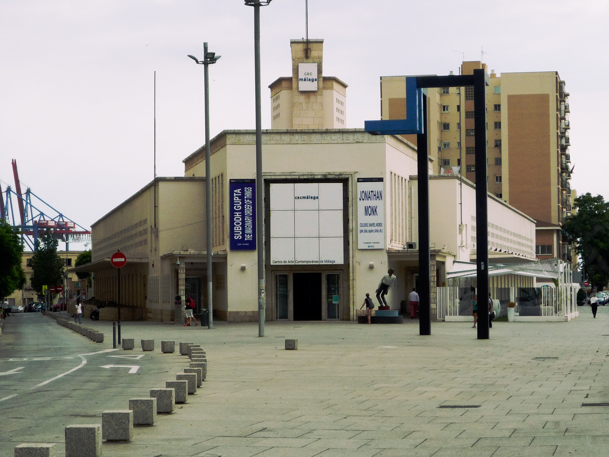 CAC Málaga, España.